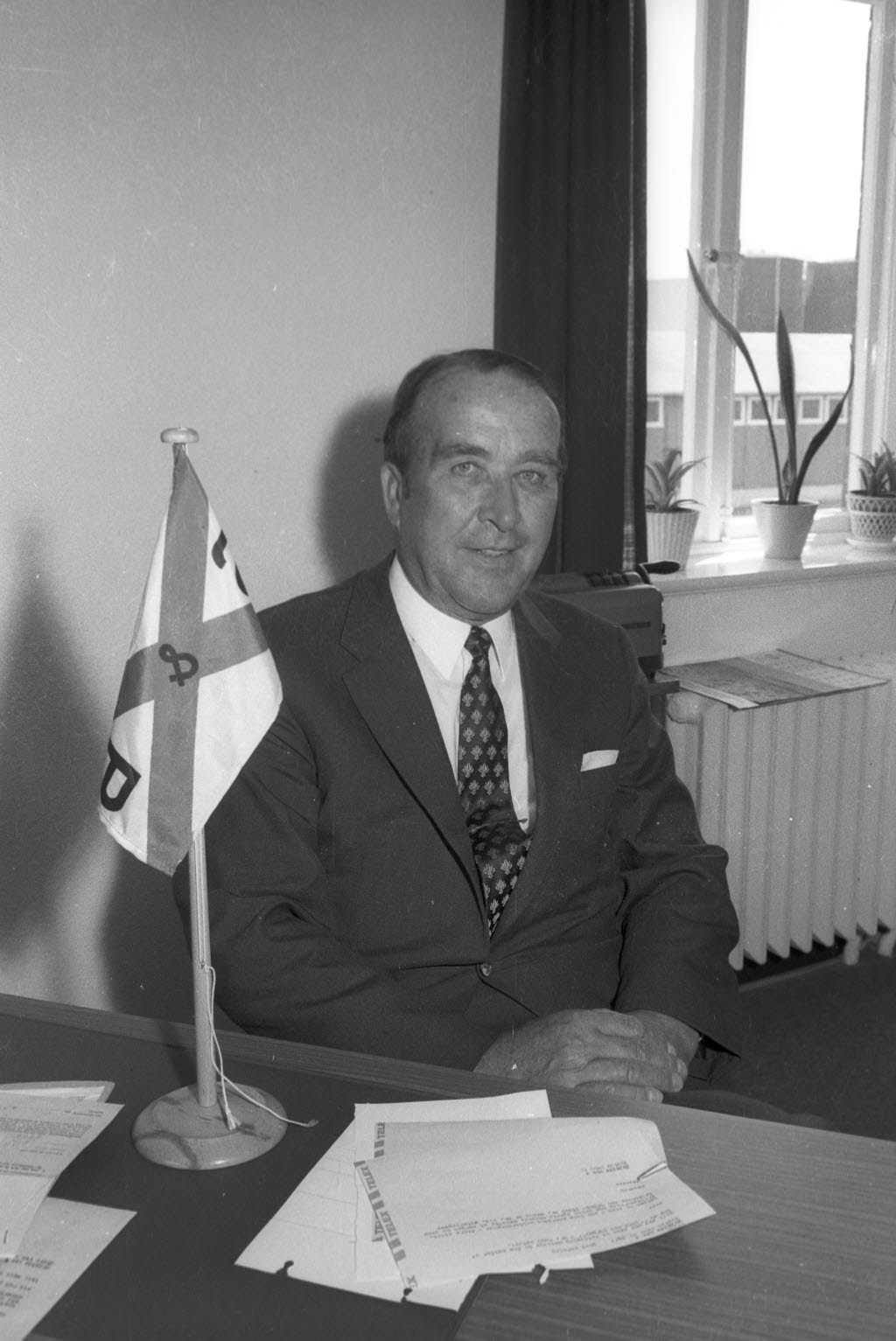 Ehemaliger Landeswirtschaftsminister.